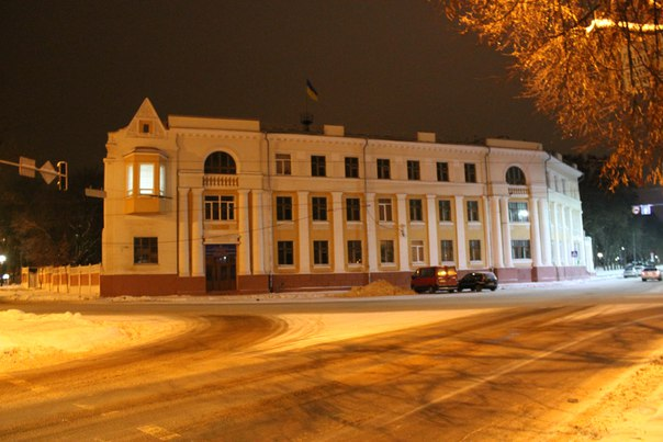 Інститут історії,етнології та правознавства ім.О.М.Лазаревського ,м.Чернігів